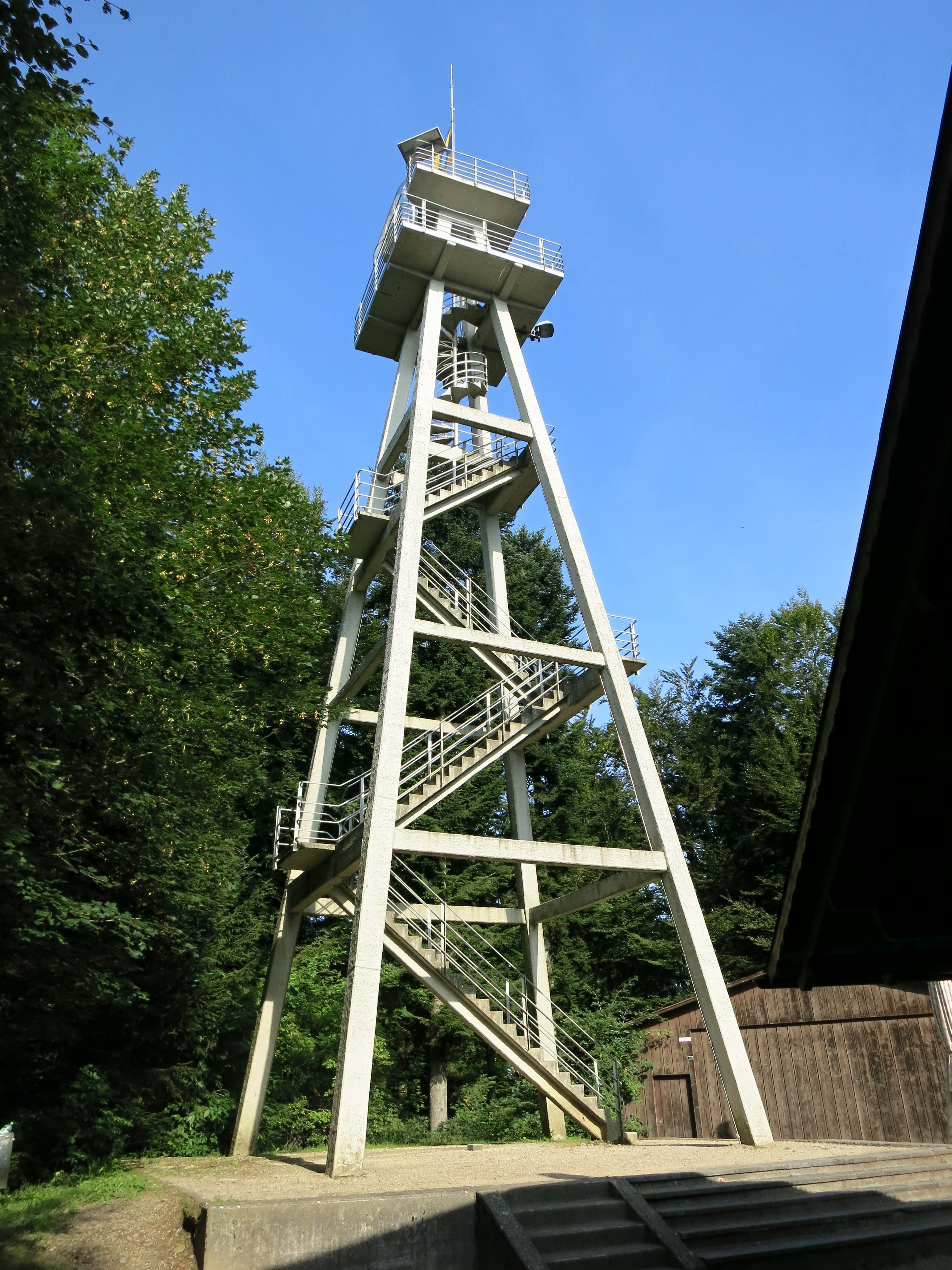 Hochwacht Reisiswil